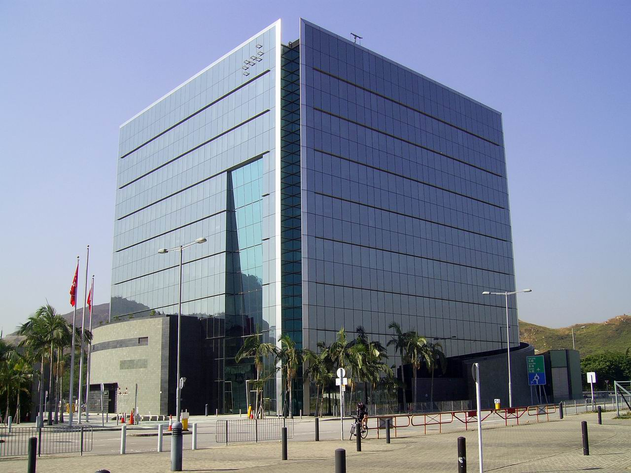 中文（香港）: 港鐵錦田大樓